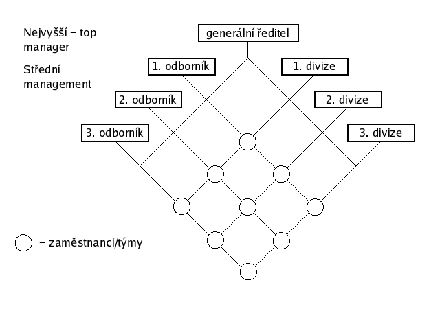 Jednoduchý obecný diagram maticové struktury.